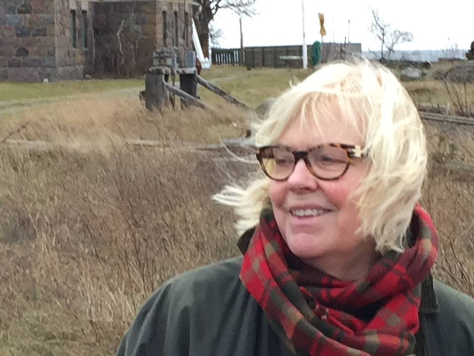 Åsa Melldahl, 2015.